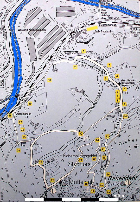 Ausschnitt, Übersichtstafel des Bergbauwanderwegs Muttental WittenLegende: 1: Besucherstollen Nachtigall, Steinbruch Dünkelberg 2: Entwicklung des Steinkohlebergbaus 3: Östlicher Tagetrieb Frielinghaus 4: Stollen Turteltaube 5: Bethaus der Bergleute 6: Halde der Zeche Hermann 7: Gebäude am Schacht Constanz 8: Zeche Hermann 9: Haspelanlage 10: Verladeanlage Zeche Jupiter 11: Stollen Stettin 12: Stollenzeche Maximus 13: Muttentalbahn 14: Stollen Fortuna 15: Halde Schacht Juno 16: Zeche Renate 17: Dreibaum 18: Gedenkstein für verunglückte Bergleute 19: Geologischer Überblick 20: Flözaufschluss 21: Göpelschacht Moses 22: Göpelschacht Wilhelm 23: Göpelschacht Heinrich 24: Westlicher Tagetieb Frielinghaus 25: Zeche Orion 26: Stollen Reiger 27: Pingenfeld Carthauserloch 28: St. Johannes Erbstollen 29: Vereinigungsstollen 30: Nachkriegssstollen 31: Tiefbauzeche Martha X: Schacht Margarethe